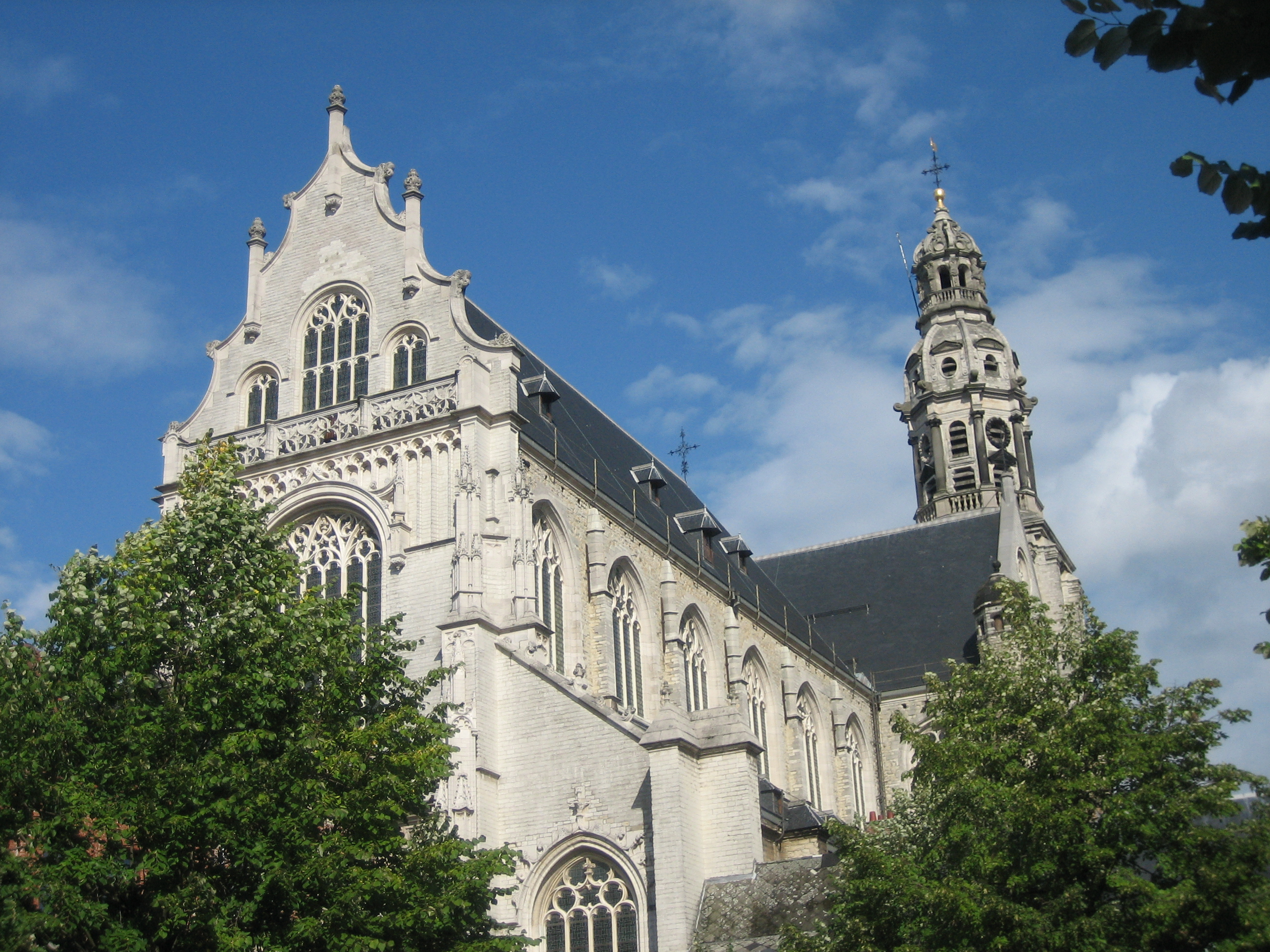 Saint Paul's church (Sint-Pauluskerk), Antwerp (B)